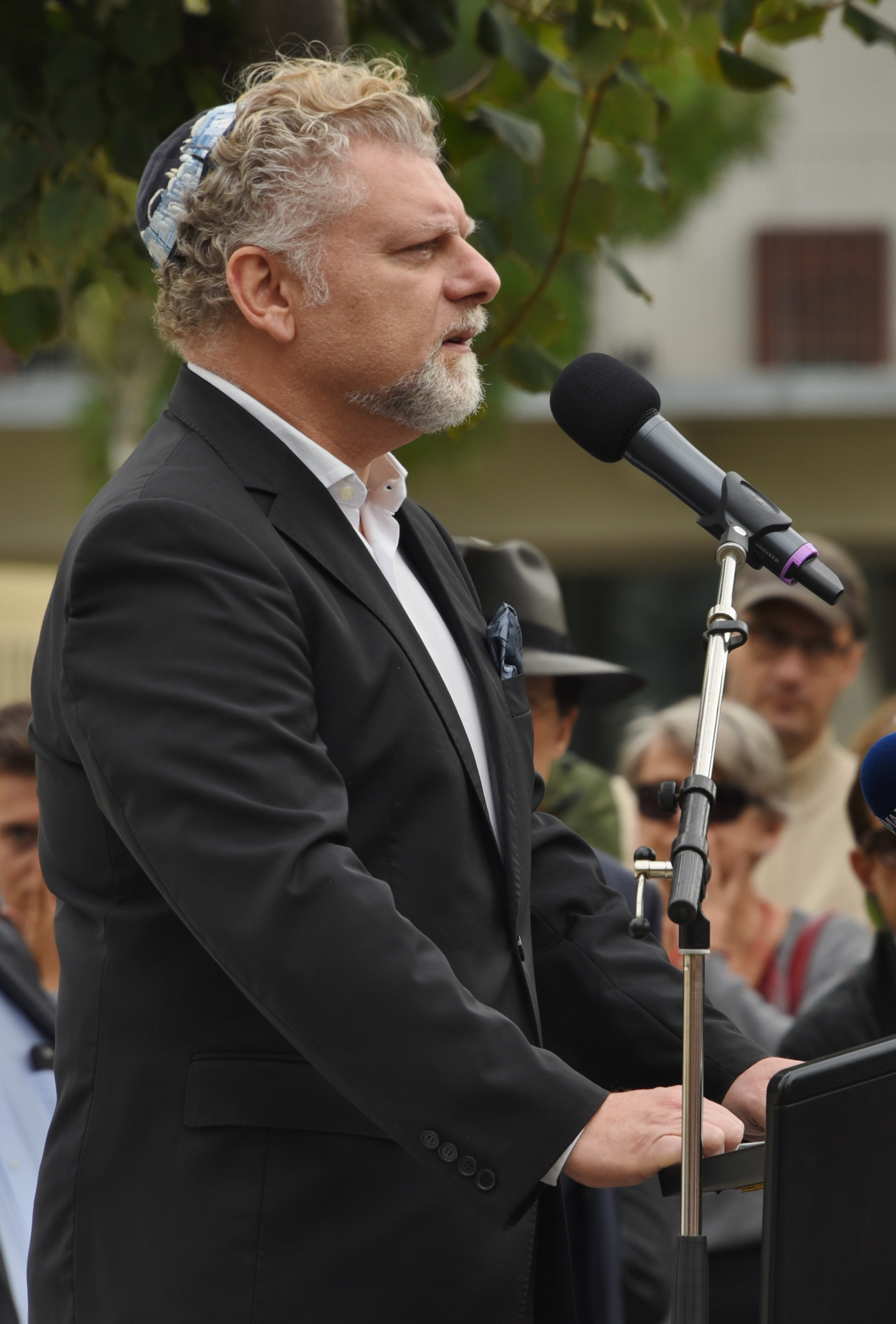 Roman Grinberg bei der Eröffnung des Aspangbahnhof-Denkmals